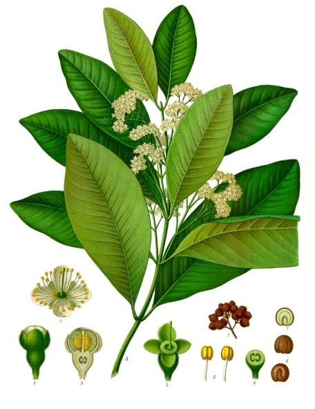 Piment. A blühender Zweig, nat. Gr.; 1 Blüthenknospe, vergrössert; 2 Blüthe von oben, desgl.; 3 dieselbe im Längsschnitt, desgl.; 4 Kelch mit Stempel, desgl.; 5 Staubgefässe, desgl.; 6 Fruchtknoten im Querschnitt, desgl.; 7 Fruchttraube, nat. Gr. (zum Theil mit 5 Kelchzipfeln, also nicht ganz mit der Natur übereinstimmend); 8 Same von verschiedenen Seiten, vergrössert; 9 derselbe zerschnitten, desgl.